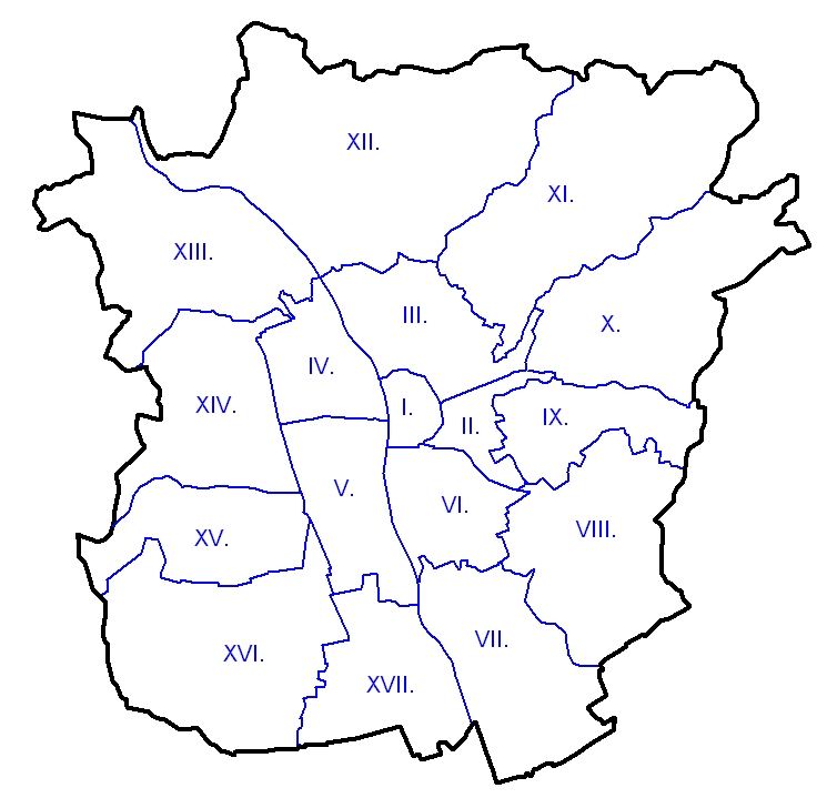 Die 17 Grazer Stadtbezirke